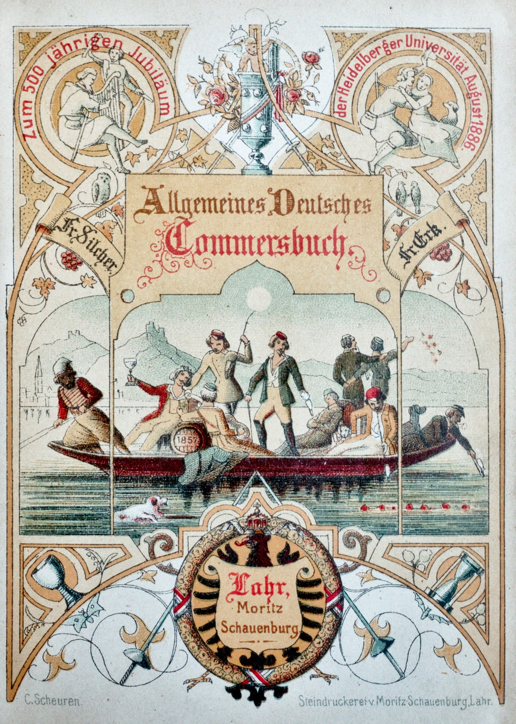 Zum 500. jährigen Jubiläum der Heidelberger Universität brachte der Verlag Moritz Schauenburg 1886 dieses Titelbild mit der 26. Auflage heraus. Es wurde bis zur 34. Auflage verwendet.